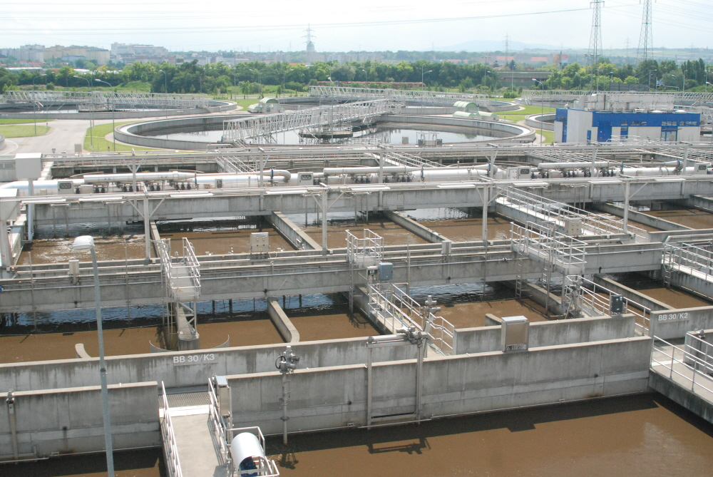 Klärbecken in der Hauptkläranlage Wien-Simmering